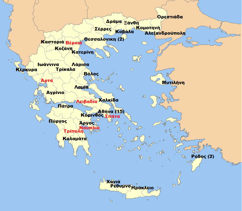 Ο χάρτης με τα καταστήματα σε όλη την Ελλάδα. Με μάυρο τα καταστήματα που υπάρχουν με κόκκινο αυτά που προβλέπονται να ανοίξουν.